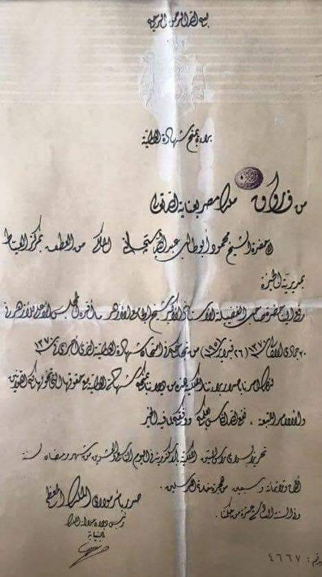 شهادة العالمية الأزهرية للشيخ محمود أبو طالب التجاني